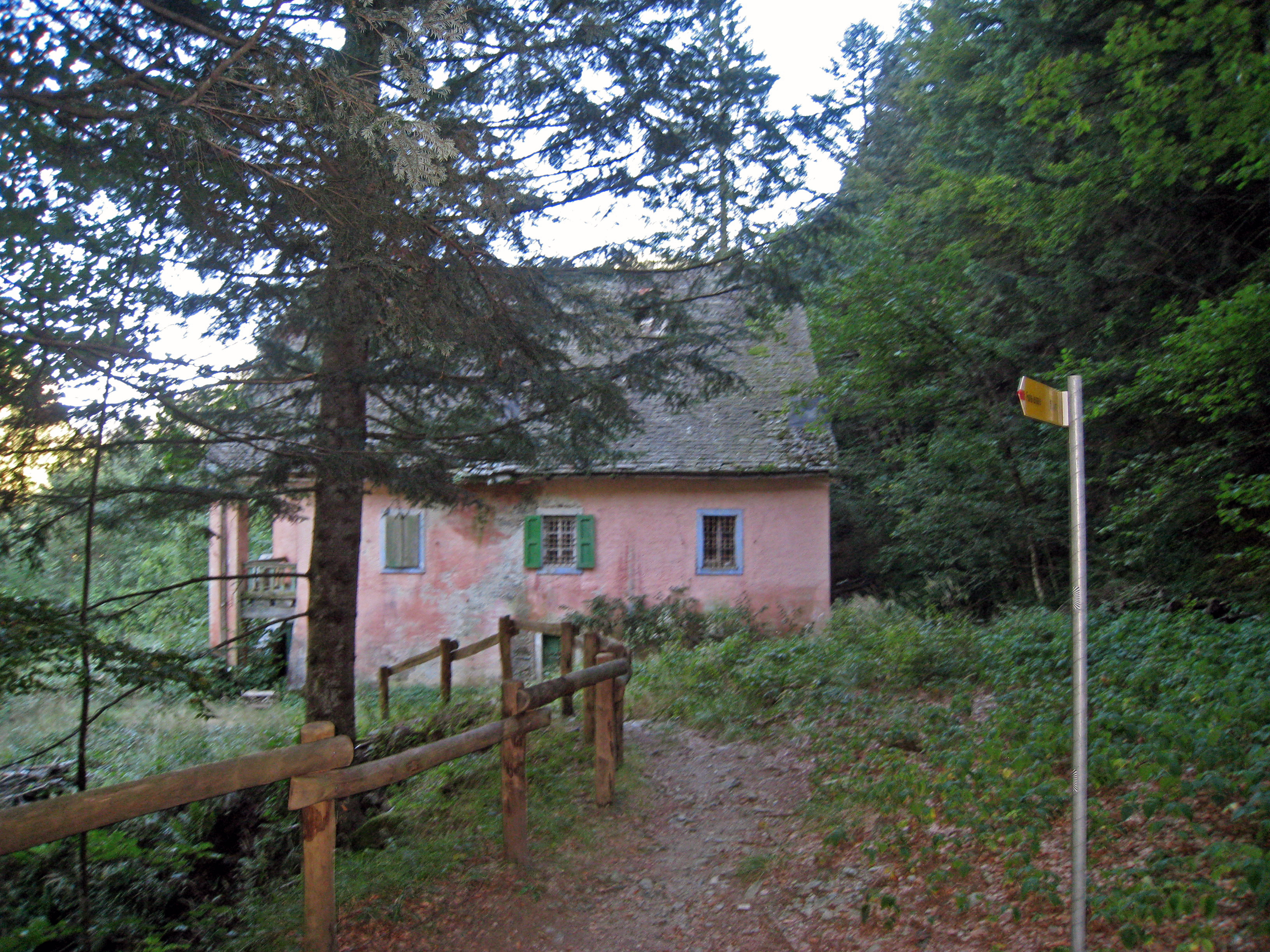 Bagni di Craveggia: Caserma Onsernone